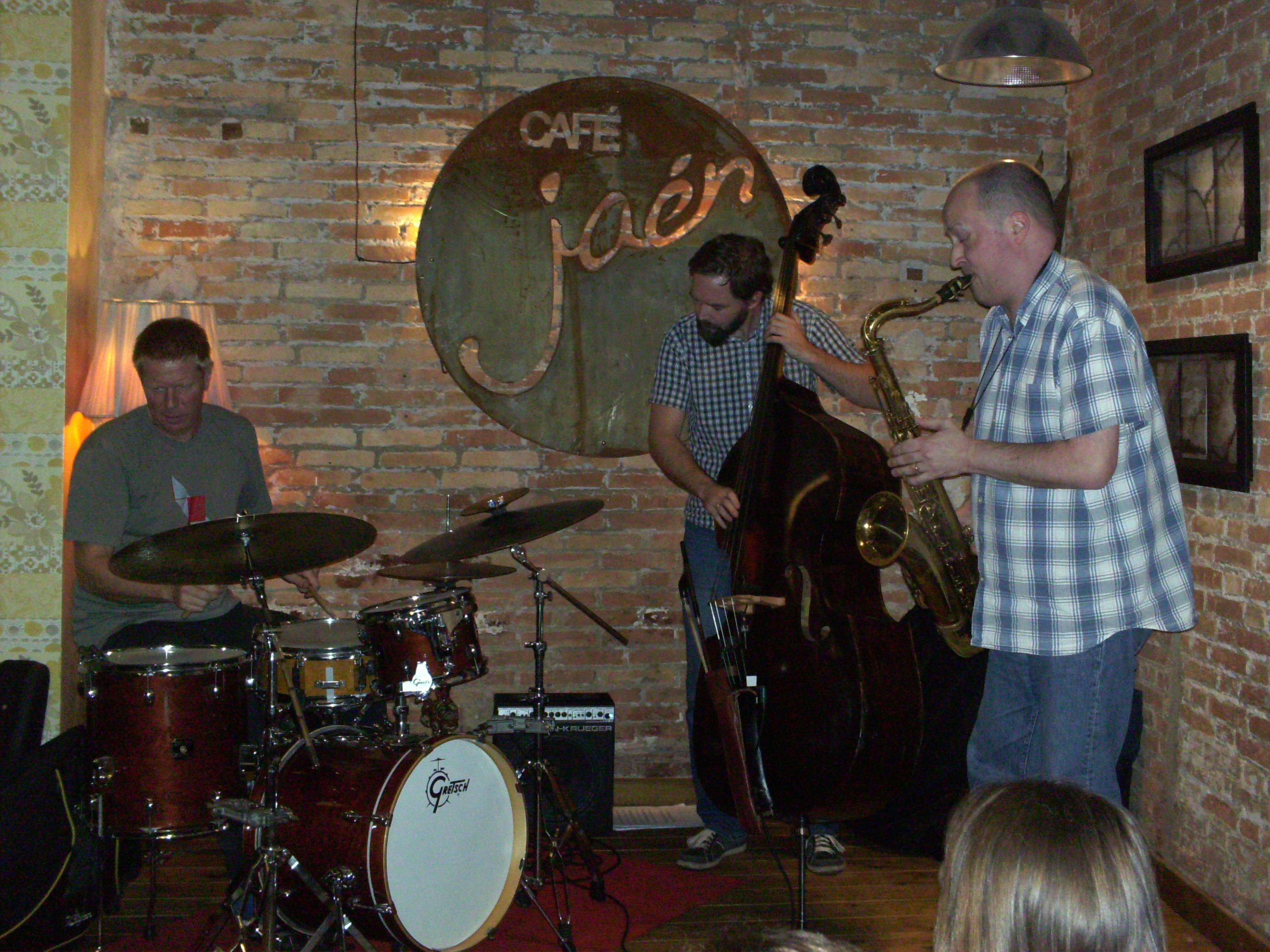 Concierto de jazz en el Café Jaén, Jaén.